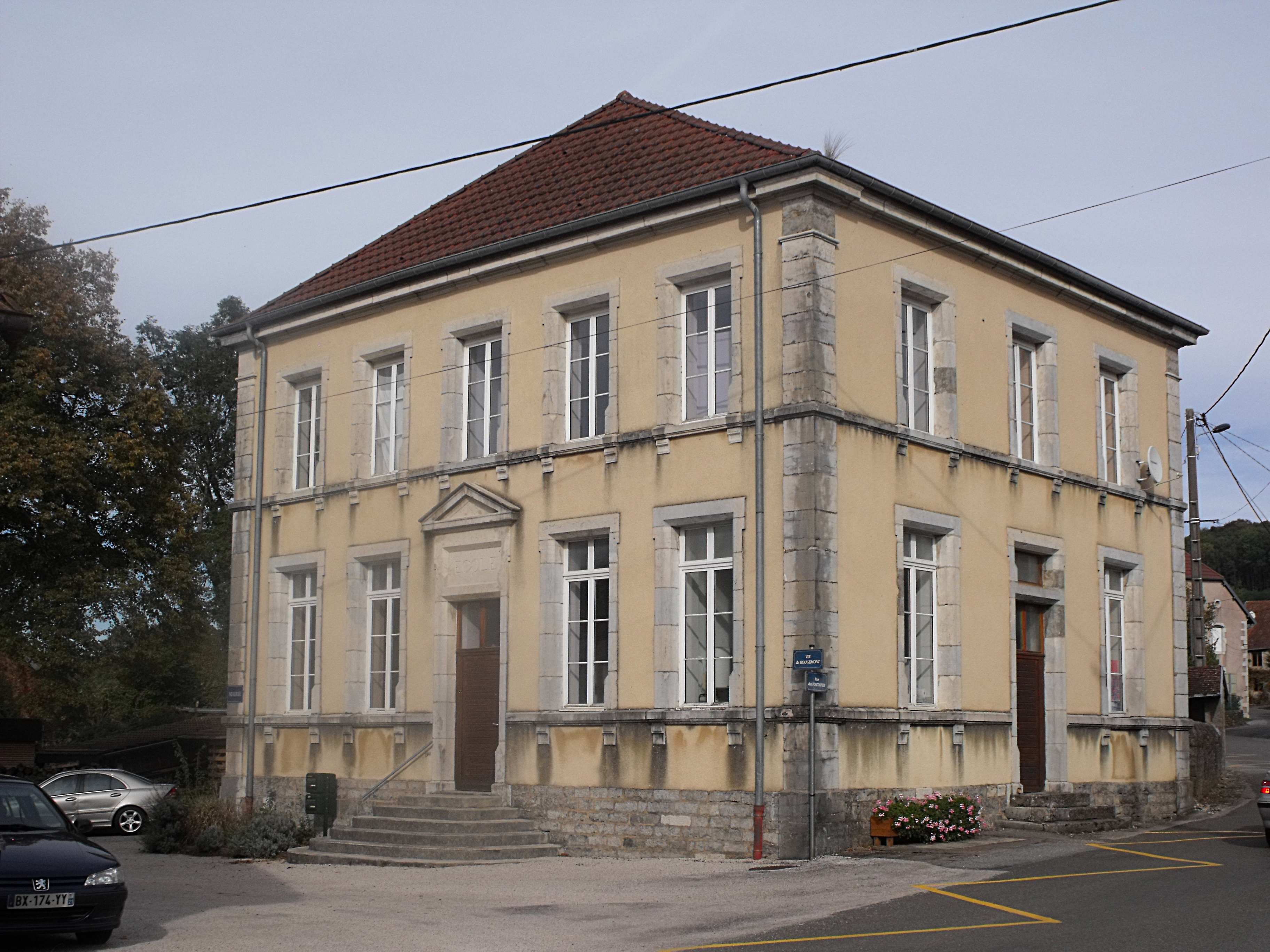 Ecole à Mésandans, Doubs, France